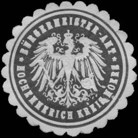 Sealing stamp Title: Bürgermeister-Amt Hochemmerich Kreis Moers Description: schwarz, weiß, geprägt Place: Hochemmerich size: 4 cm